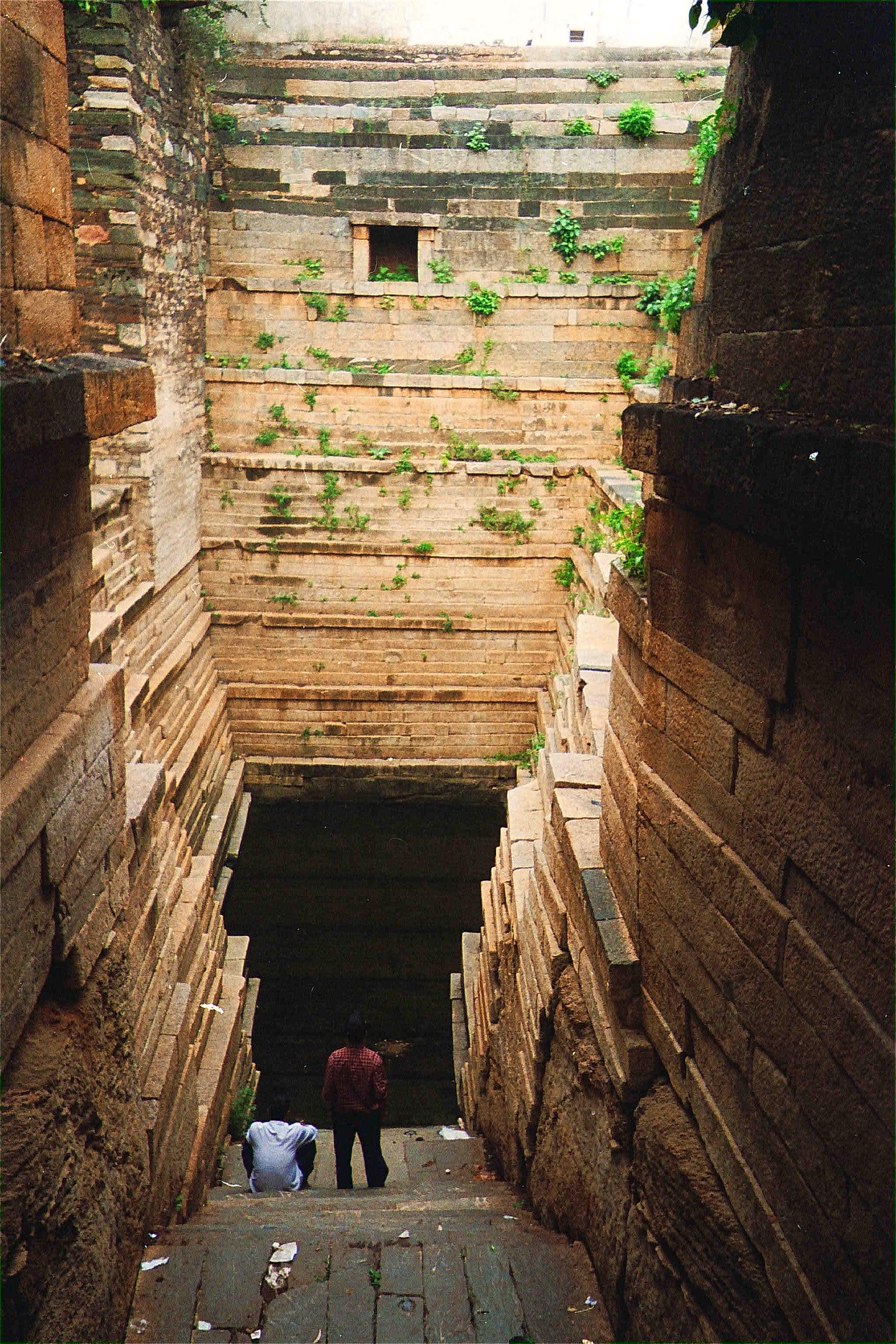 Well at Trikuteshwara Temple, Gadag, (Hubli Dist) Karnataka, India.AuthorUser:Clt13